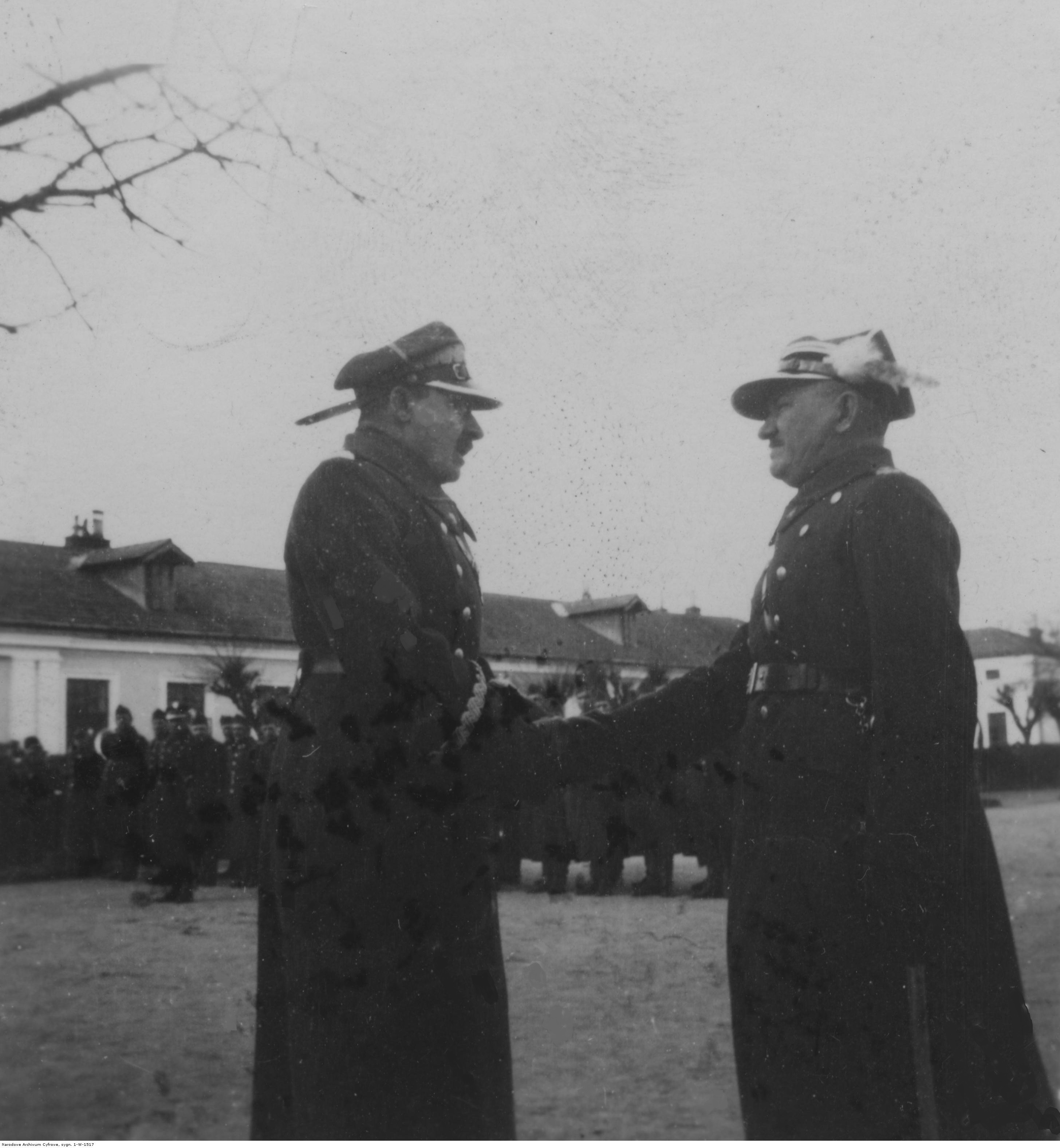 Pożegnanie dowódcy 22 Pułku Artylerii Lekkiej w Przemyślu. Generał Stanisław Wieroński (z lewej) żegna płk. Romana Wolla, dotychczasowego dowódcę 22 pal-u. Koncern Ilustrowany Kurier Codzienny - Archiwum Ilustracji. Sygnatura: 1-W-1517